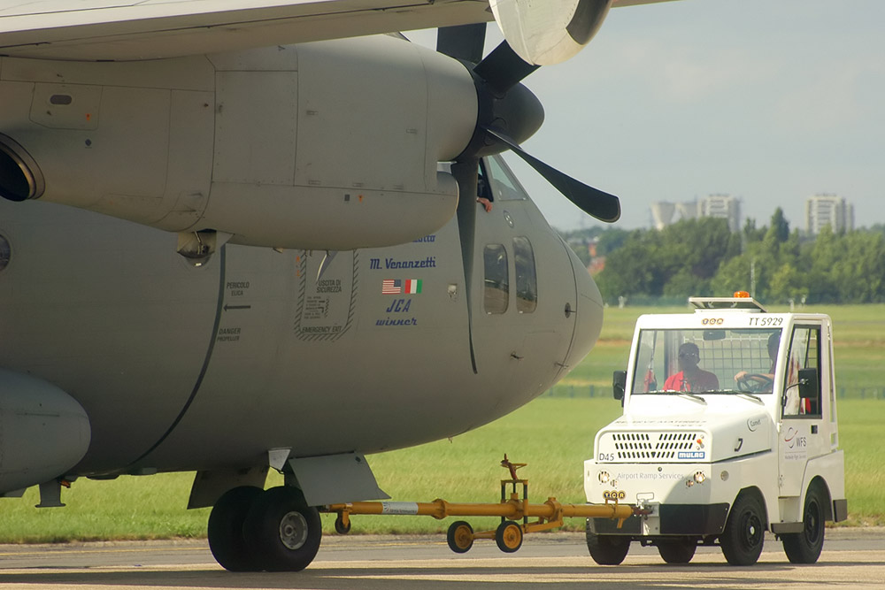 Alenia C27J Spartan